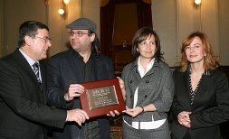 Dolan Mor